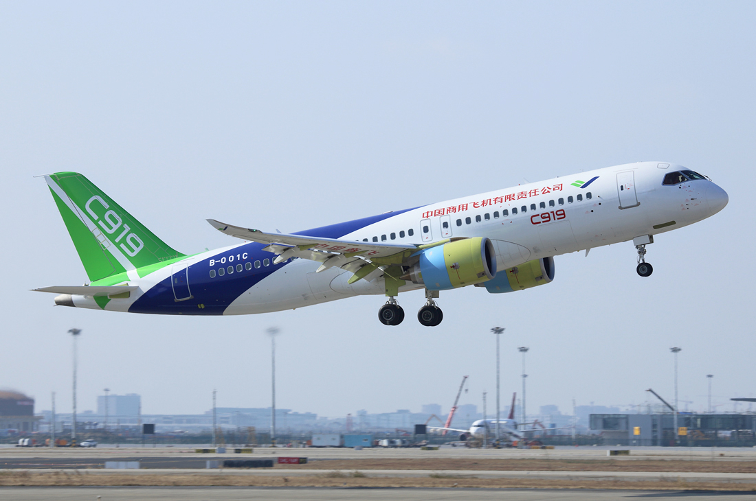 COMAC - Commercial Aircraft Corporation Of China COMAC C919 Reg.: B-001C MSN: 102 Shanghai - Pudong International (PVG / ZSPD) China - December 17, 2017 Early rotation during take off on rwy 34R, the 2nd C919 is doing its first flight